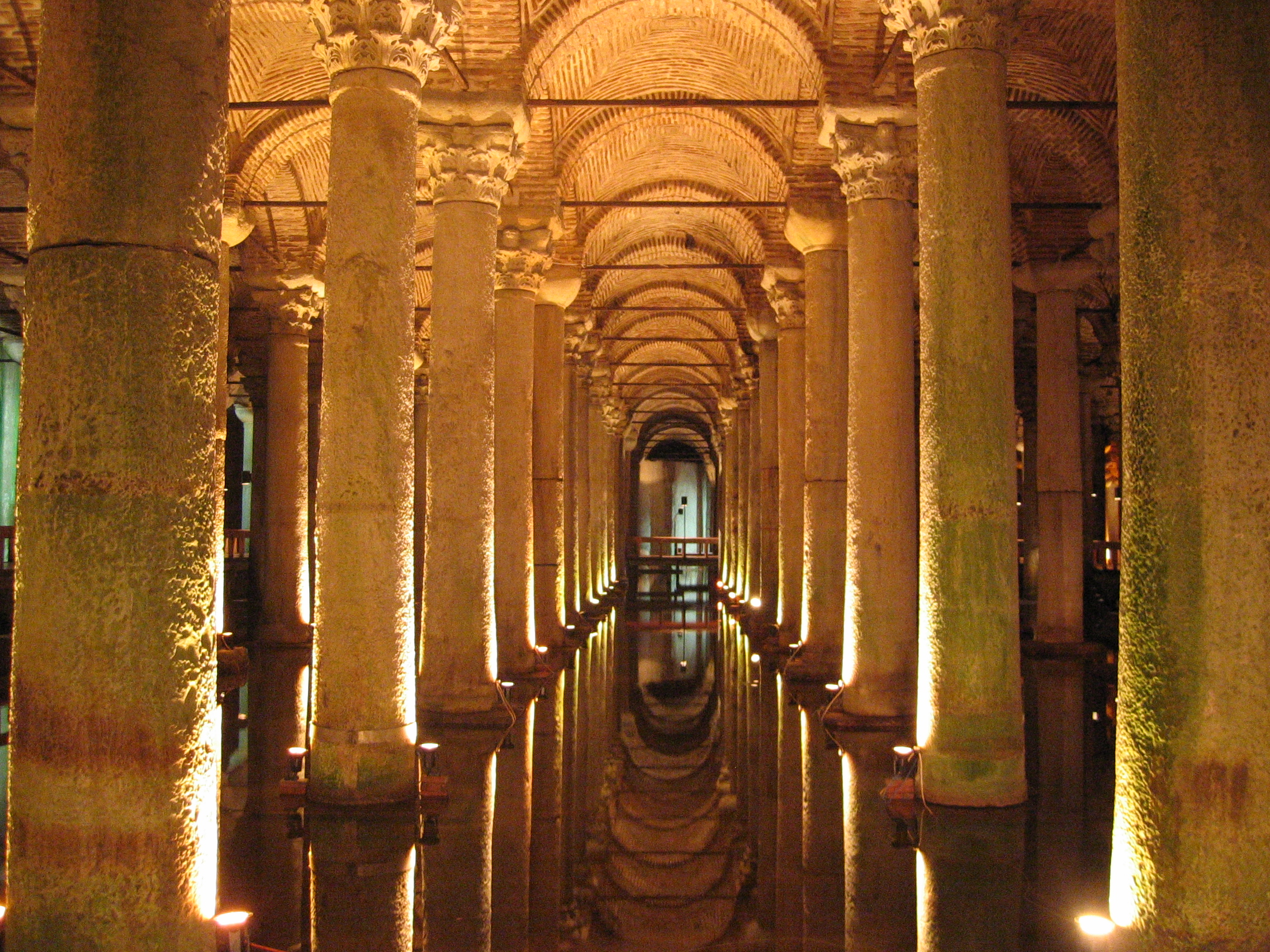 Istanbul Basilica Cystern